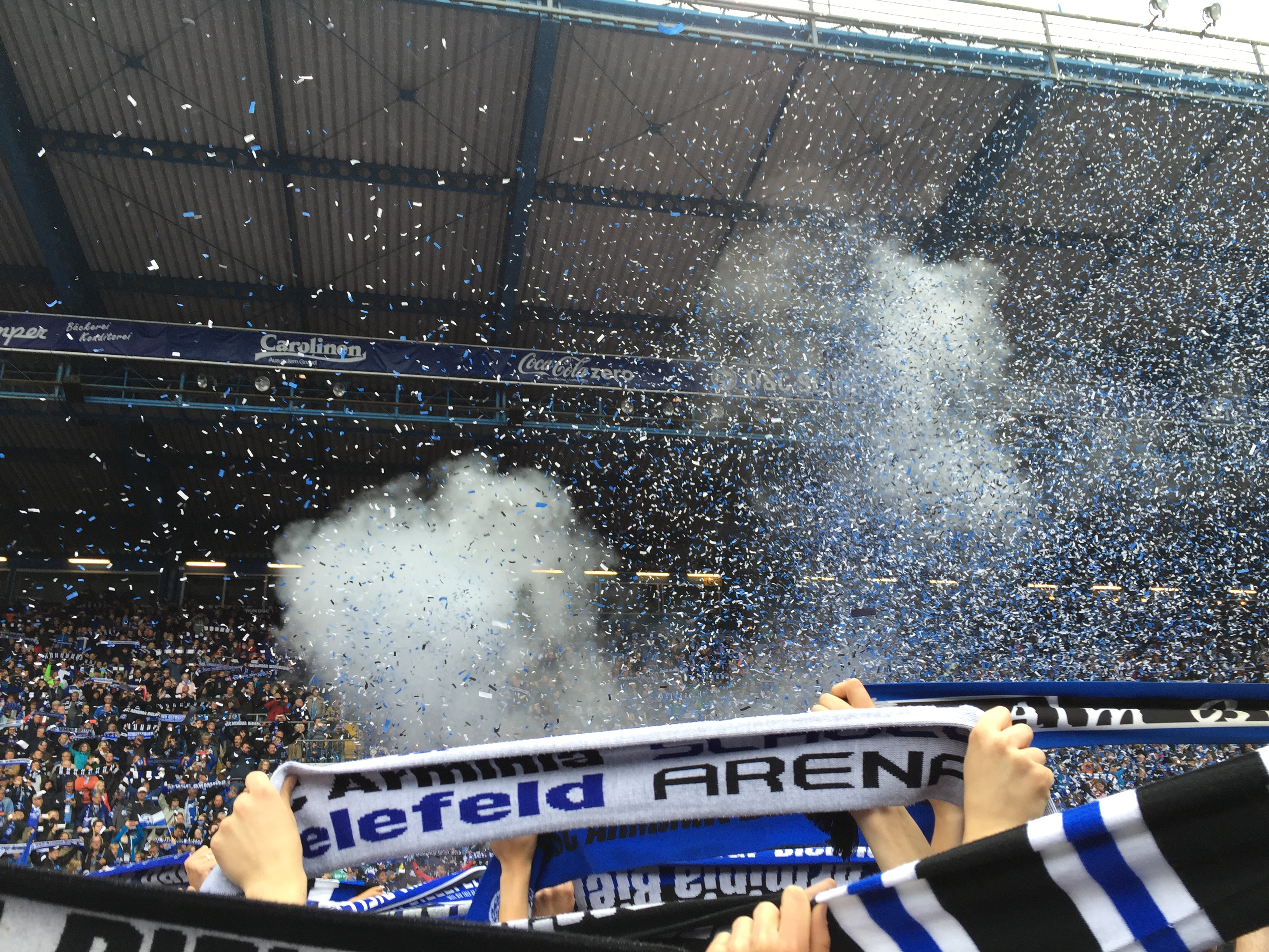 Feier zum Aufstieg in die 2. Bundesliga im Jahr 2015 auf dem Rasen der Bielefelder Alm (SchücoArena).